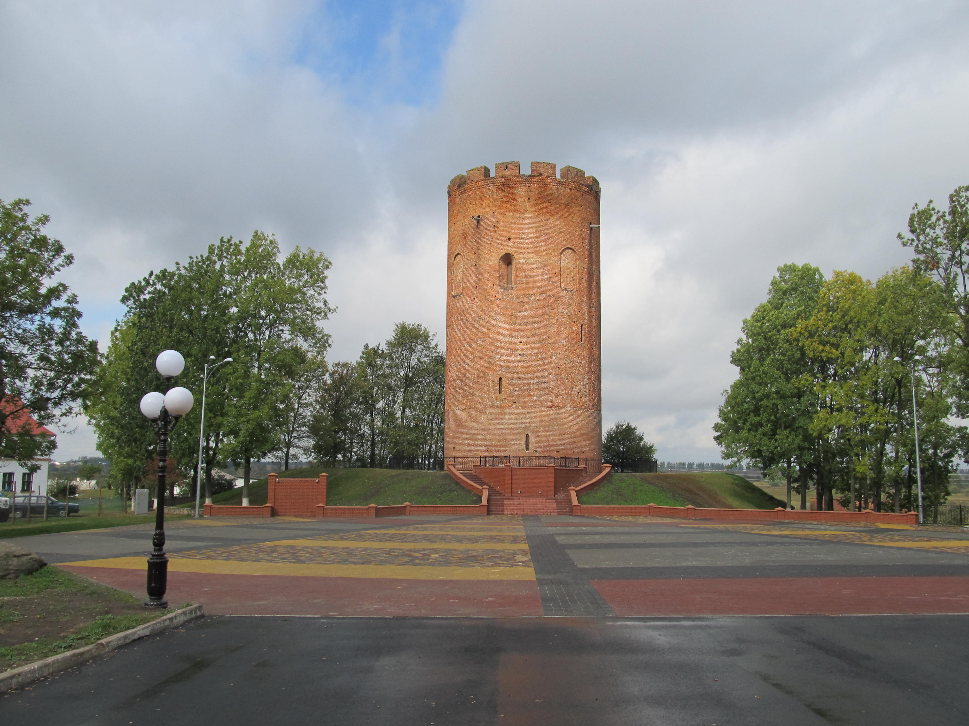 Беларуская (тарашкевіца): Камянецкая вежа. г. Камянец This is a photo of Belarusian heritage monument. Reference number: 110Г000321 ( WLM)